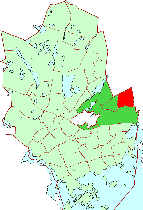 Lintuvaara/Fågelberga district in Espoo city, Finland